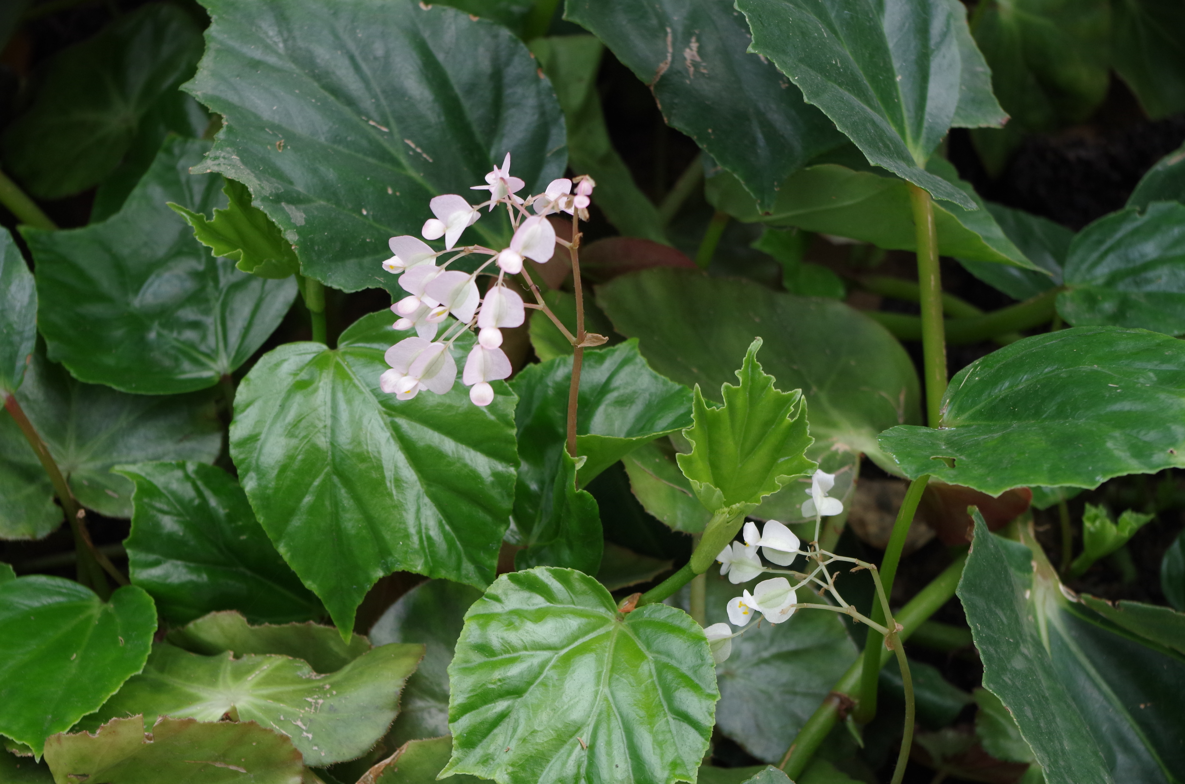 Convolvulacea - Kew Gardens